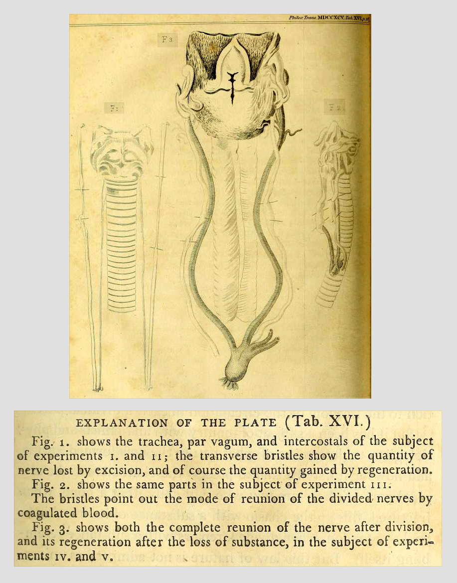 Skizze zu einem Experiment